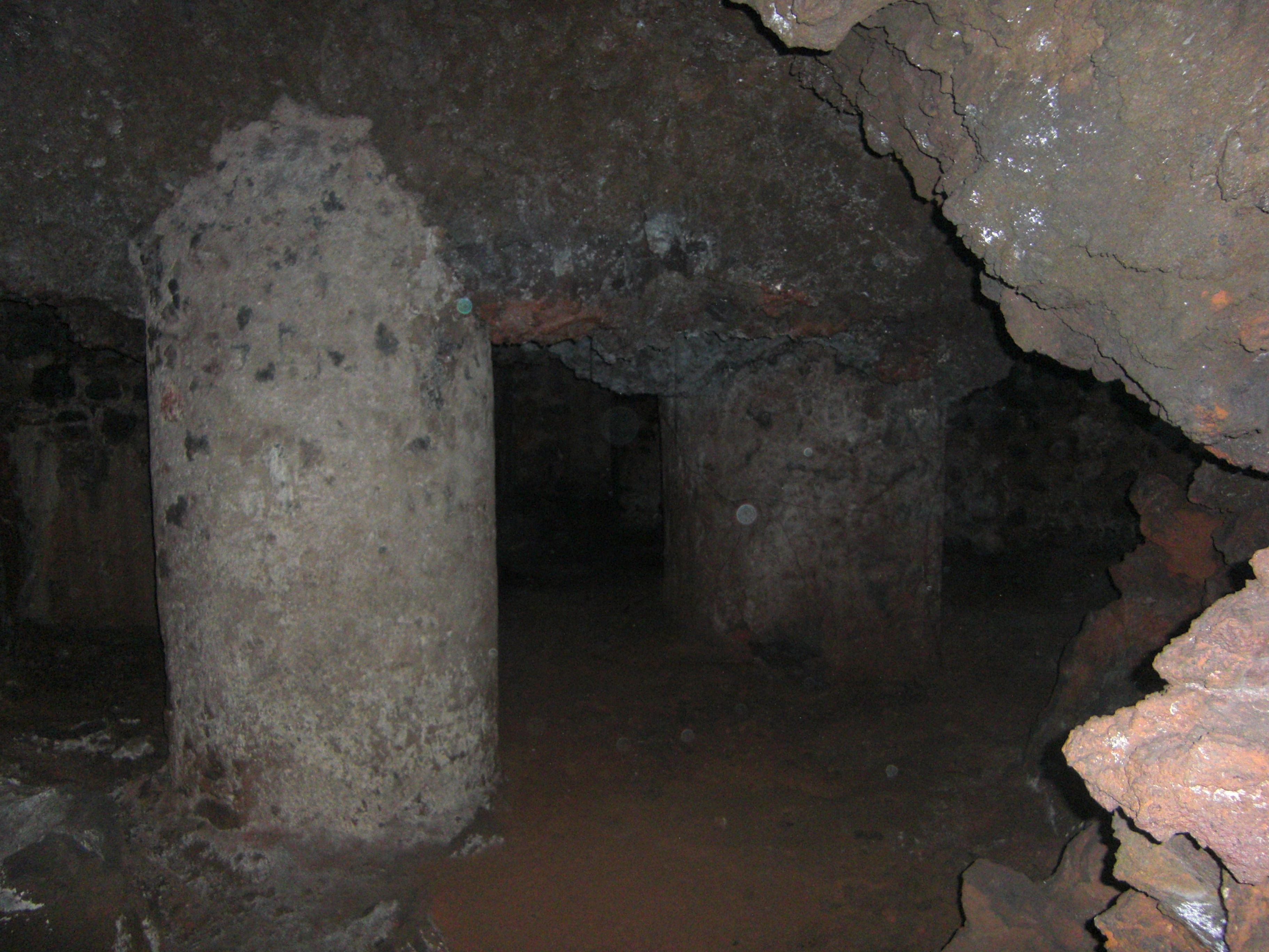 sala principale di un rifugio ricavato all'interno di una cava di via stazzone Licenza Polfranco at it.wikipedia, the copyright holder of this work, hereby publishes it under the following licenses: Attribution: Polfranco at it.wikipedia